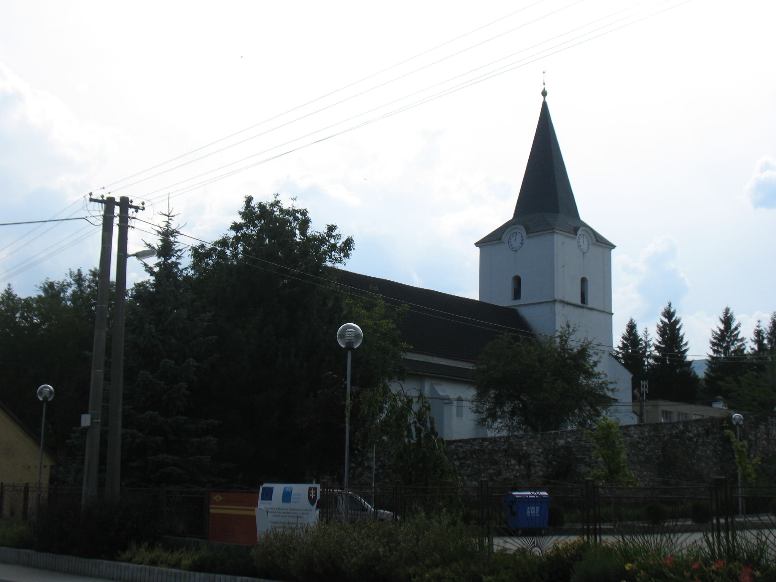 BerzéteSlovenčina: Kostol Reformovanej kresťanskej cirkvi v Brzotíne, okres Rožňava